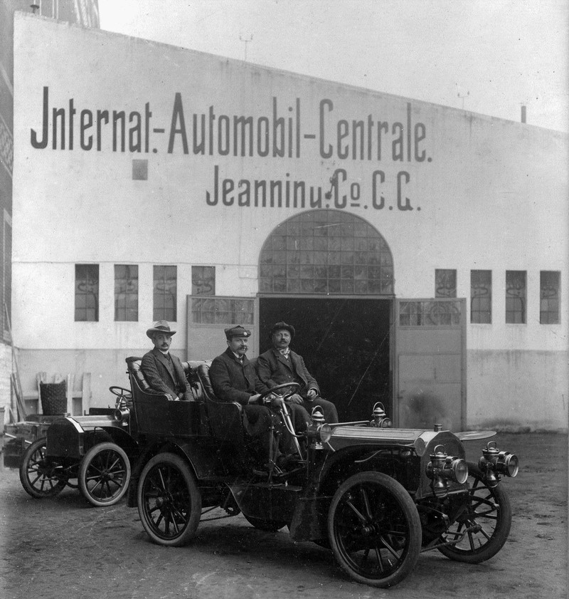 Vor dem Jeannin/Argus Werk, 1902/1903. Henri Jeannin am Steuer